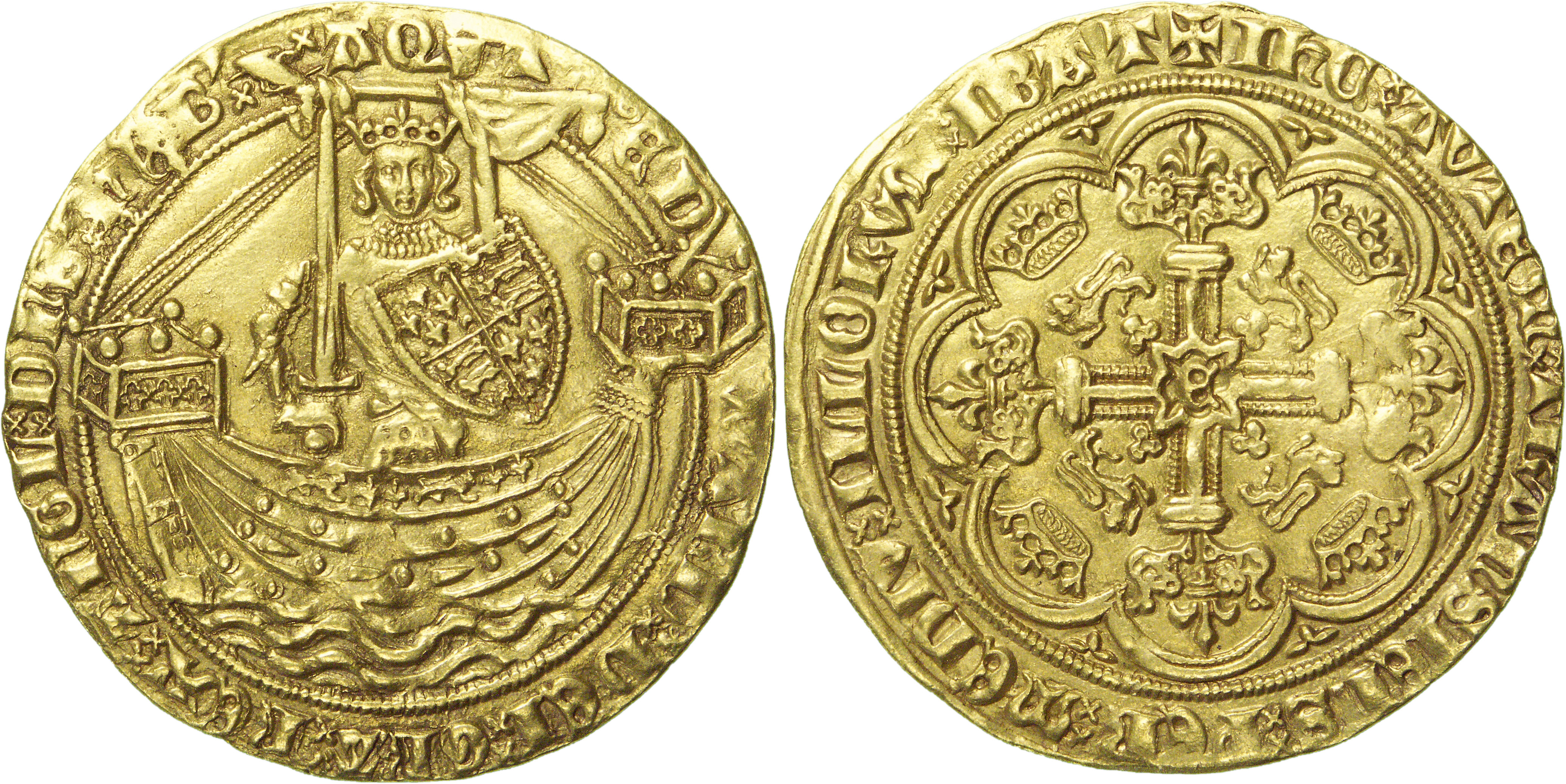 Nom de l'atelier/ville : Londres Métal : or Diamètre : 34mm Axe des coins : 3h. Poids : 7,63g. Titulature avers : ° ED-WARDx DEIx GRAx REXx AnGLx DnSx HYBx Zx AQVT’, (ponctuation par simple sautoir). Description avers : Édouard couronné, en cote de mailles, debout à mi-corps dans une nef vue de profil, tenant l'épée haute de la main droite et de la gauche l'écu écartelé de France et d’Angleterre. Traduction avers : (Édouard, par la grâce de Dieu, roi de France et d’Angleterre, seigneur d’Irlande et d’Aquitaine). Titulature revers : + Ih'Cx AVTEmx TRANSIEnSx PERx mEDIVx ILLORVmx IBAT, (ponctuation par deux sautoirs superposés). Description revers : Croix feuillue et fleurdelisée portant en cœur un quadrilobe anglé contenant un E oncial, cantonnée de quatre léopards couronnés ; le tout dans un octolobe cantonné de huit petits trèfles. Traduction revers : (Mais Jésus, passant parmi eux, continue son chemin, Luc, IV, 30). Fabrication: ~1361-1369